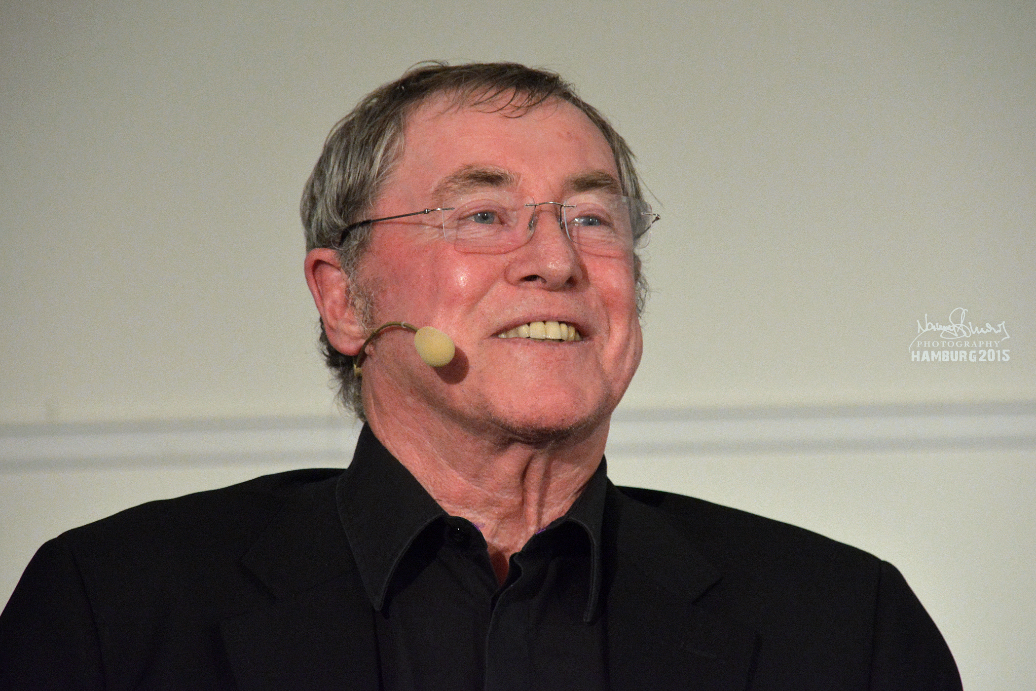 Hamburg_20151013_12